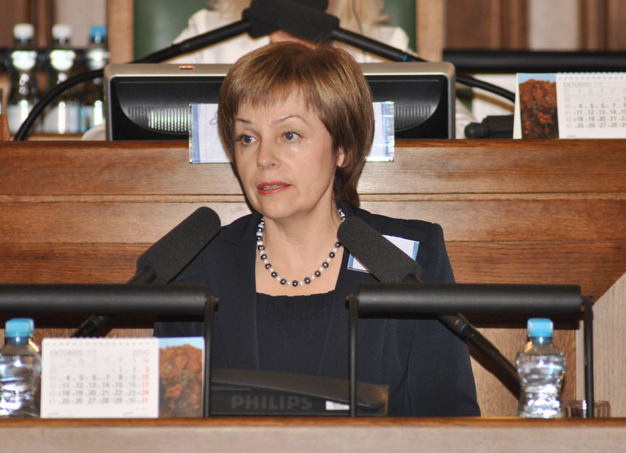 2010.gada 22.oktobris. Saeimas sēžu zālē notiek Baltijas Asamblejas 29.sesija. Attēlā: Lietuvas veselības ministra vietniece Nora Ribokiene (Nora Ribokienė). Foto: Saeima